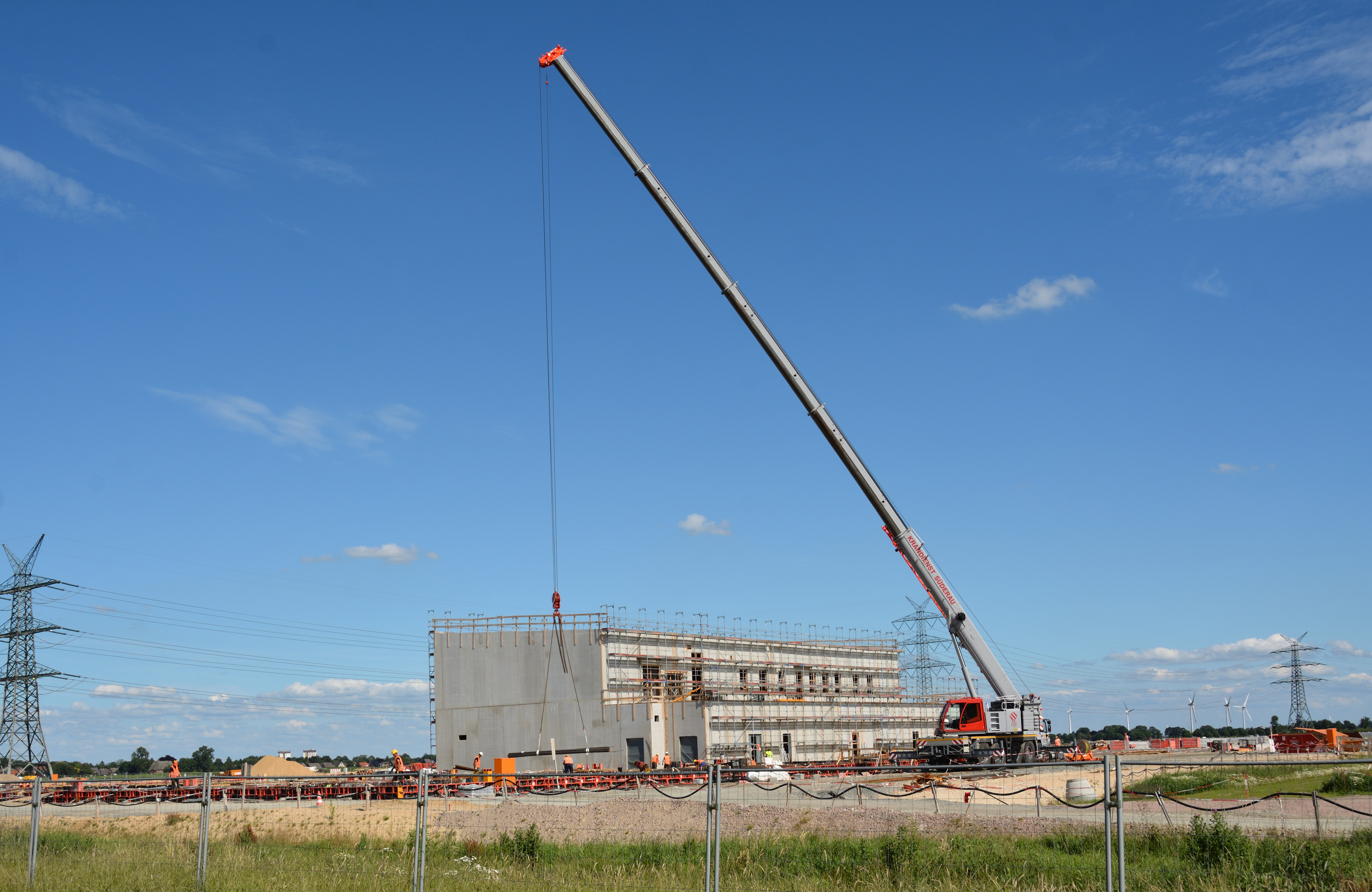 Die Baustelle (Servicegebäude Konverterstation) des Endpunktes der geplanten HGÜ-Leitung NordLink südlich vom Umspannwerk Wilster in Nortorf.